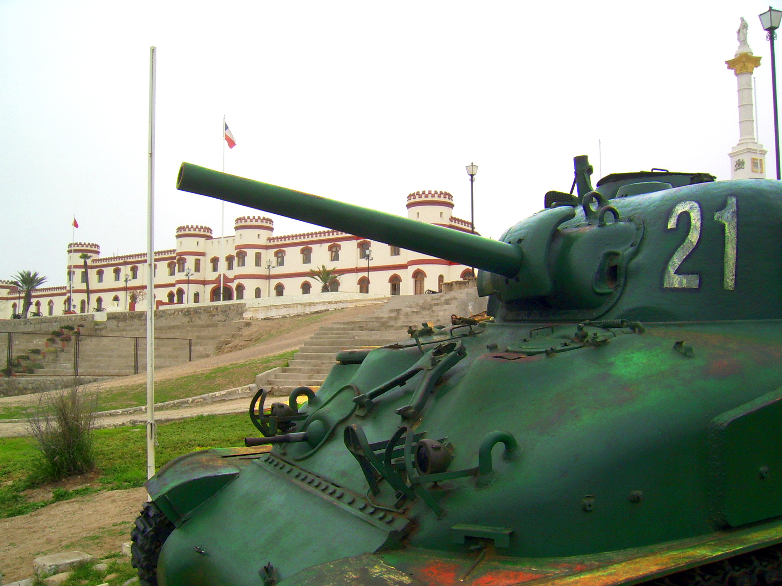 Vista del Regimiento N° 21 "Coquimbo", ubicado en La Serena, Chile.